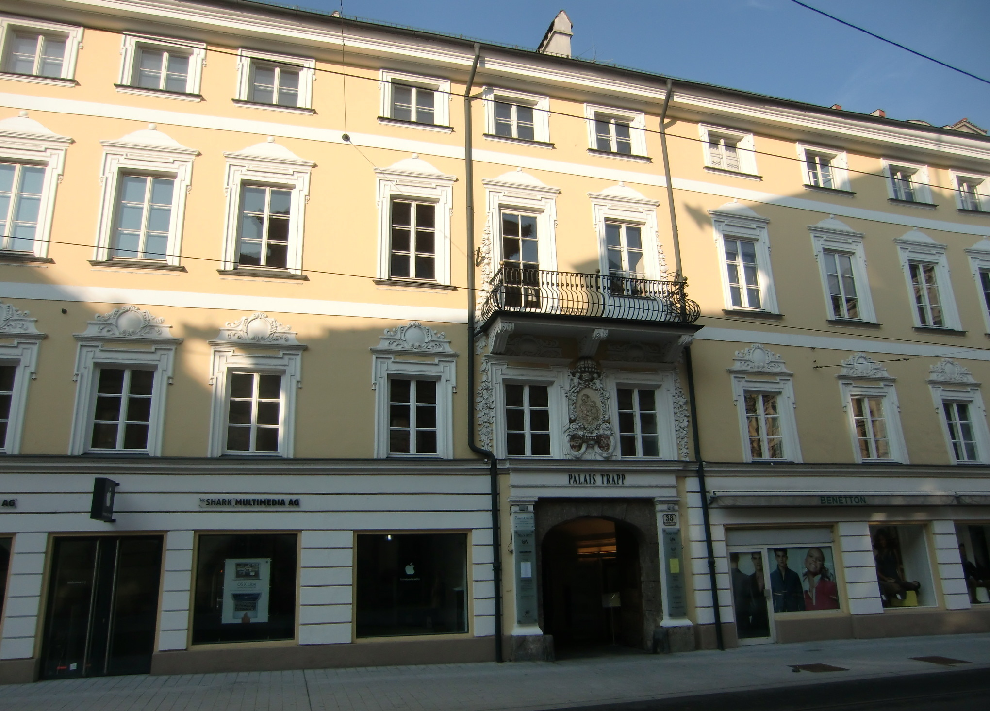 Palais Trapp/Wolkenstein